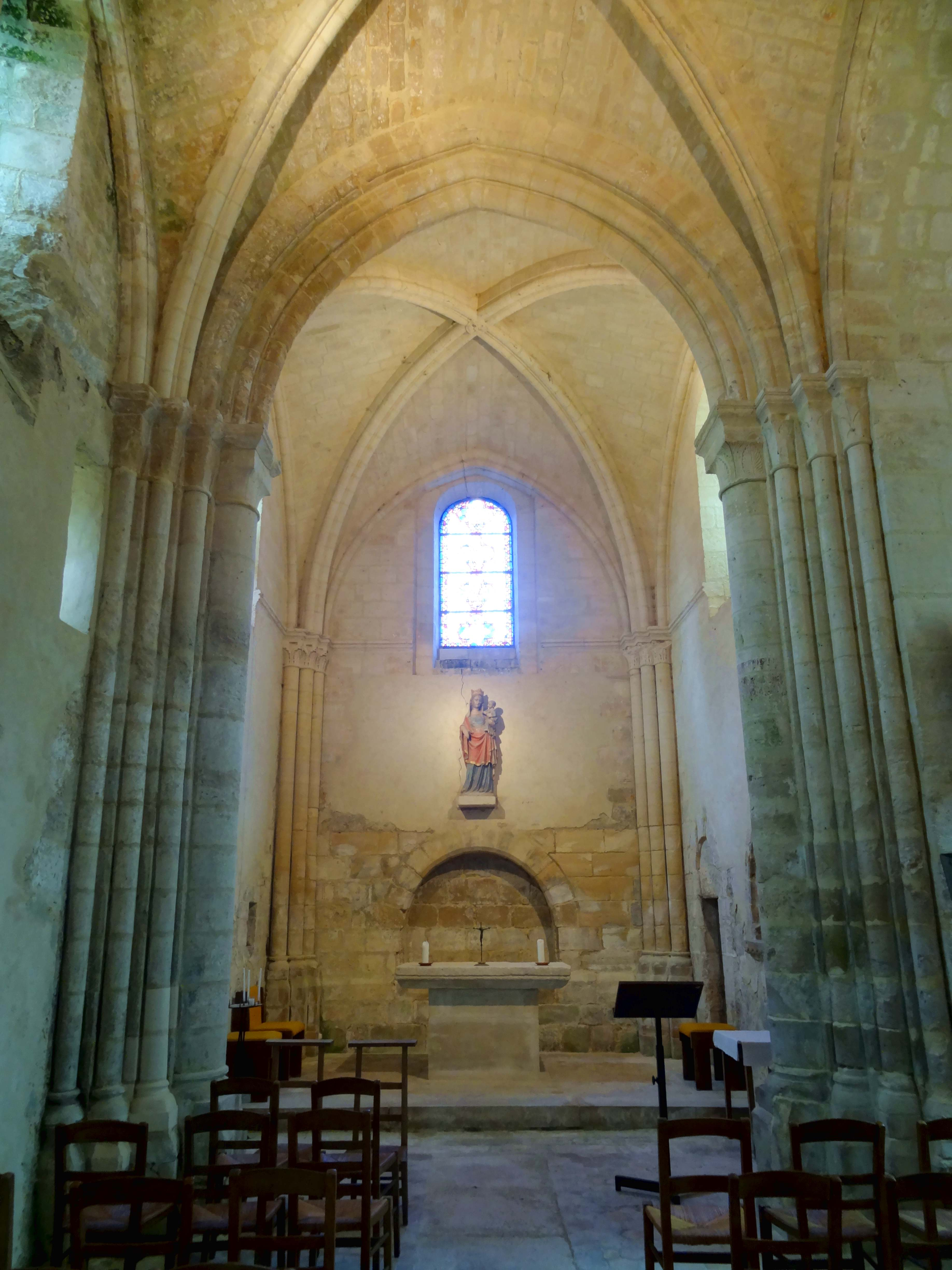 Intérieur de l'église - voir titre.